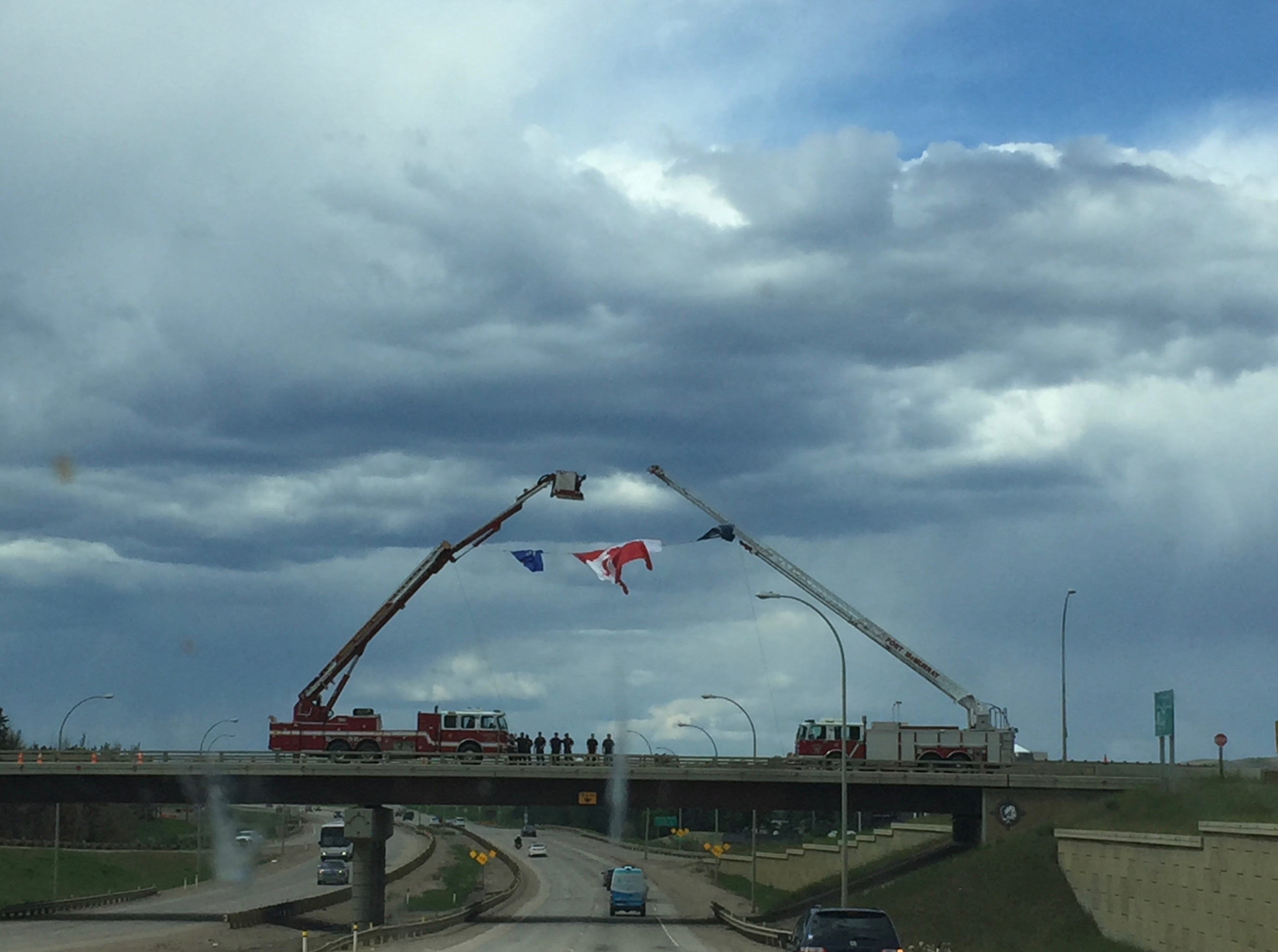 رجال الدفاع المدني يرجبون بعودة السكان يوم 4 حزيران/يونيو